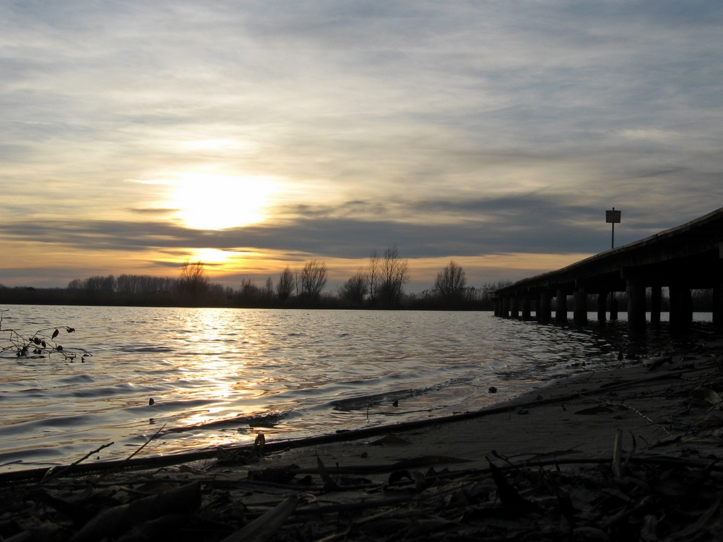 Kun-Fehér-tó a januári naplementében